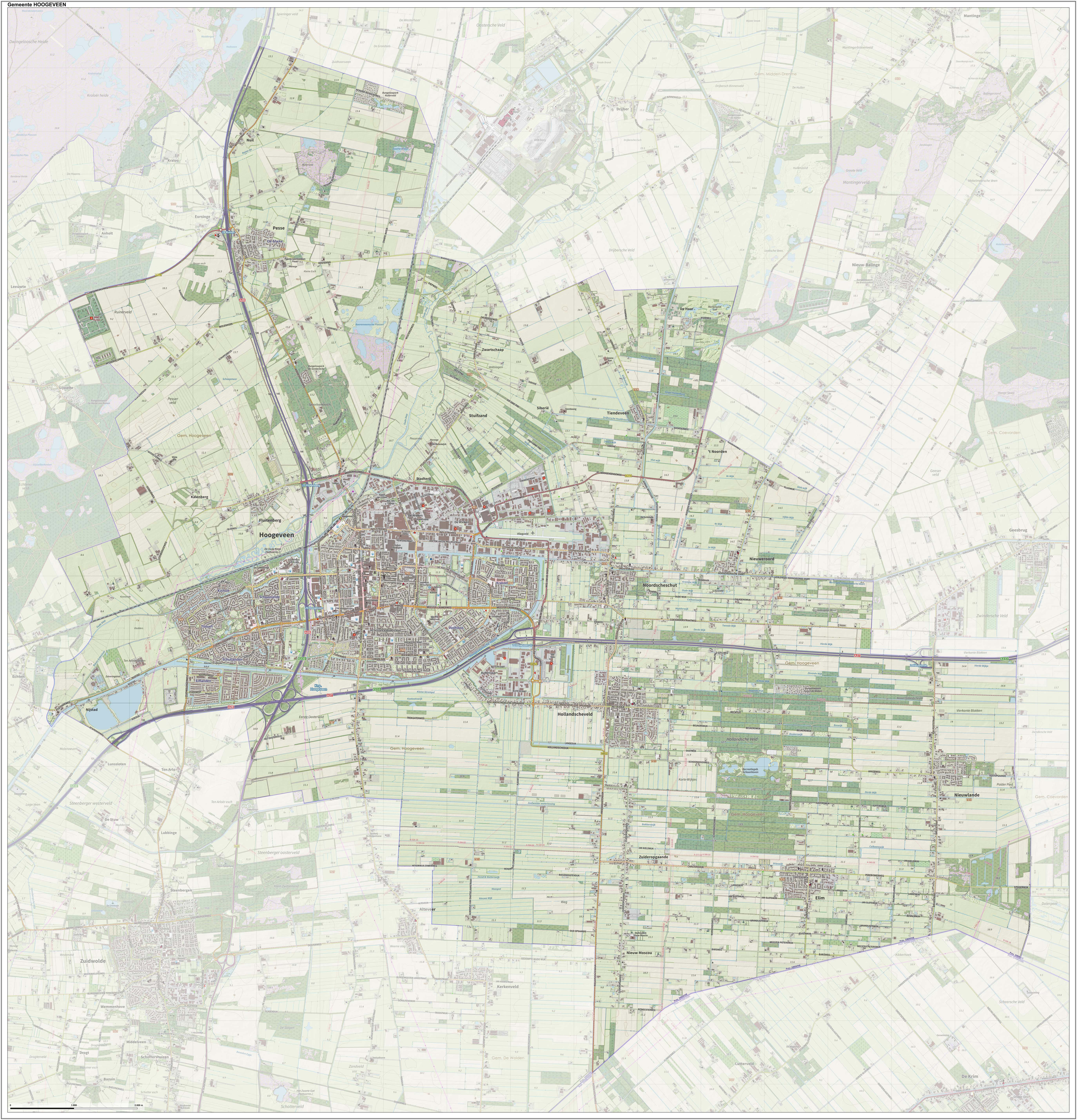 Topografische gemeentekaart. Resolutie: 400 pixels/km. Kaartbeeld samengesteld uit de open geodata van de Top10NL en Top25namen (Kadaster), Creative Commons-BY licentie. Gebouwvlakken uit open geodata BAG extract. Wegen uit de OpenStreetMap, OpenStreetMap community. Reliëfschaduw uit de Actuele Hoogtekaart AHN2. Samenstelling en kleurenschema: Jan-Willem van Aalst, met QGIS. Zie ook de Legenda.